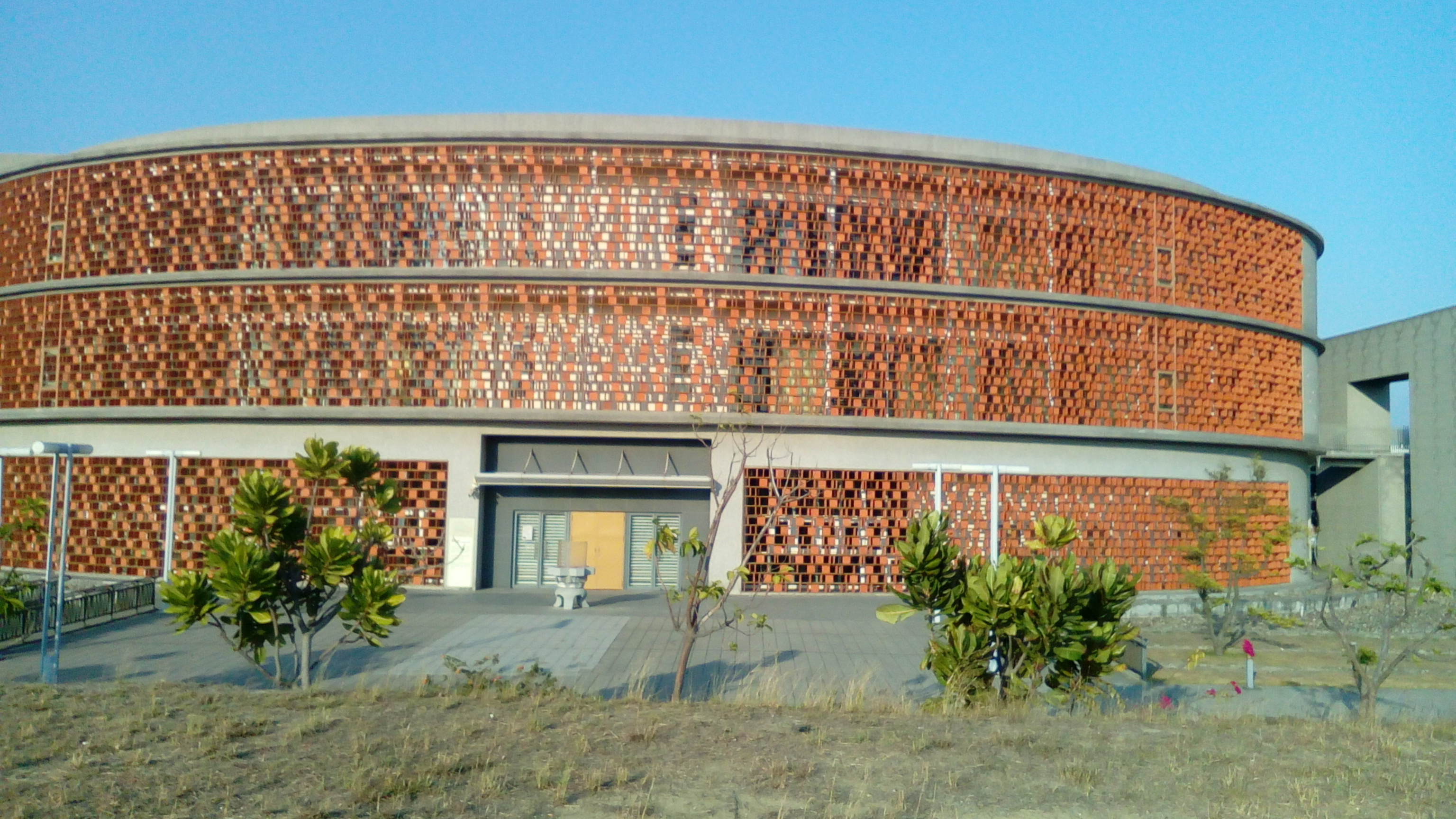 位於旗津區中部 勞動女性紀念公園東側